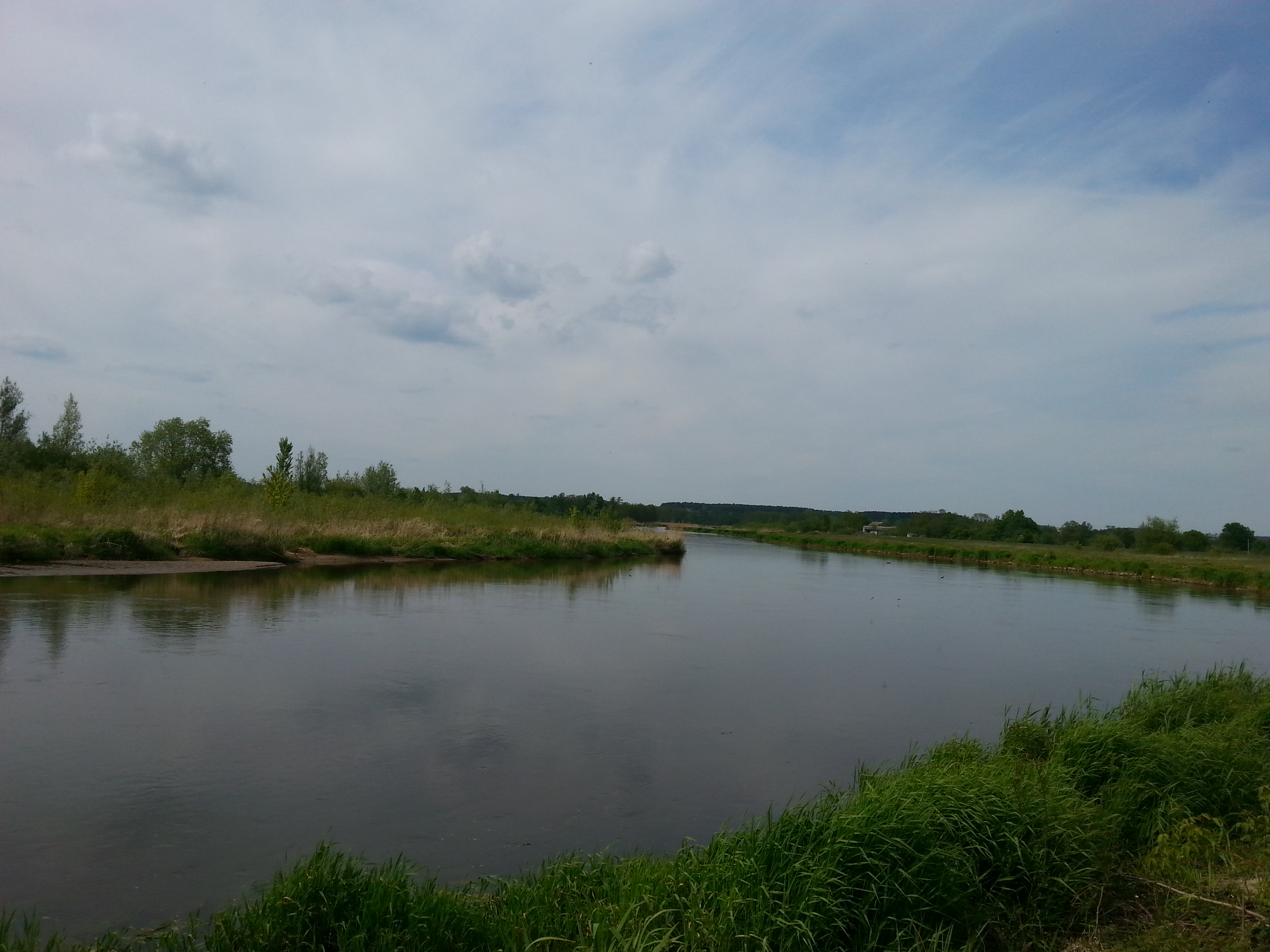 rzeka Pilica Brzeźce woj. mazowieckie